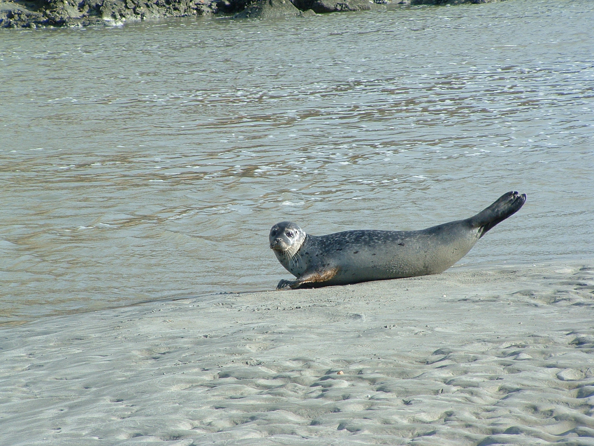 Abbaye du Mont Saint Michel - Merveille du monde